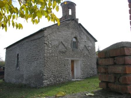 ანაგა